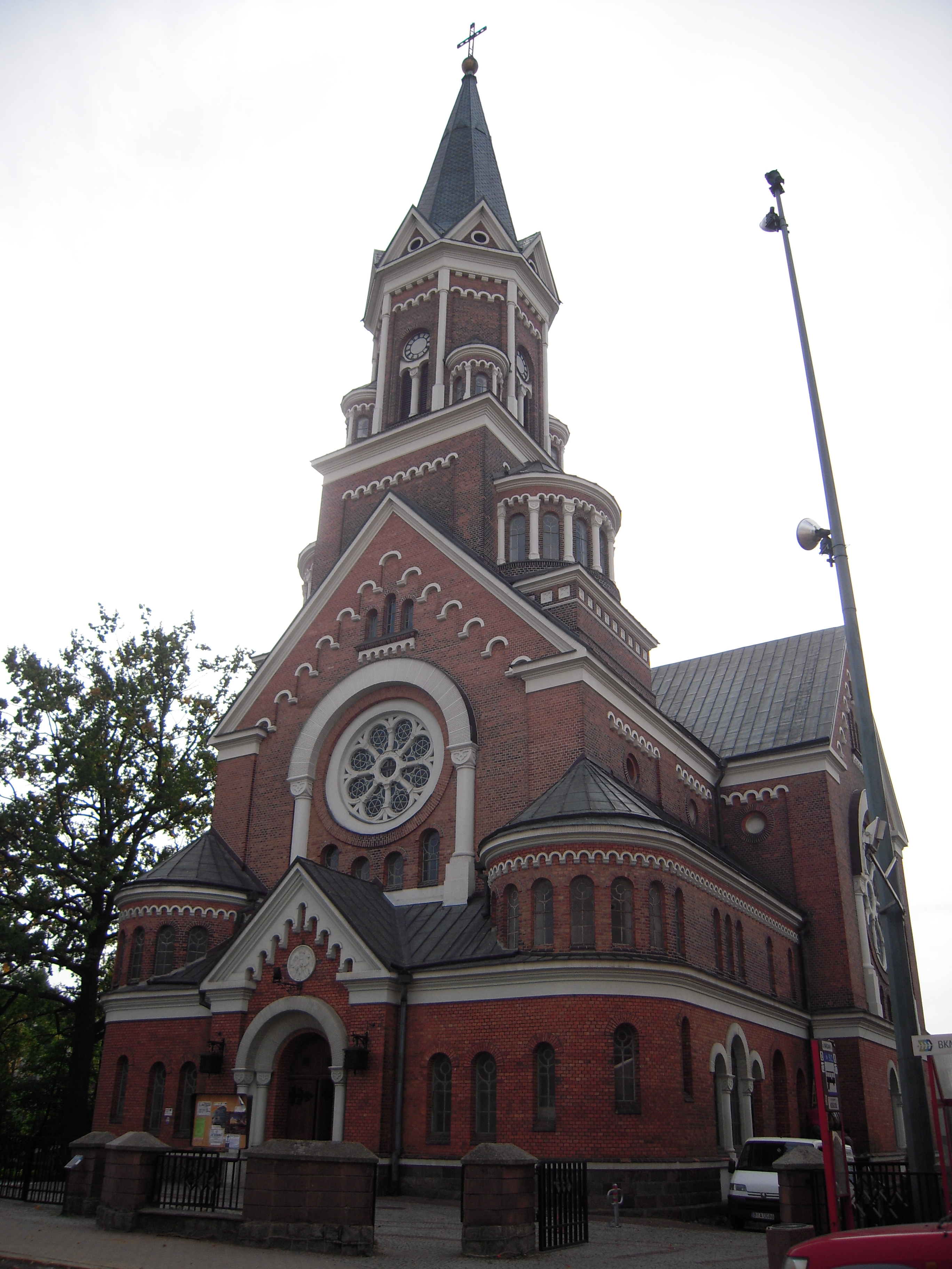 Białystok ul. Warszawska 46 - Kościół parafialny p.w. św. Wojciecha (zabytek nr A-206 z 6.12.1969)